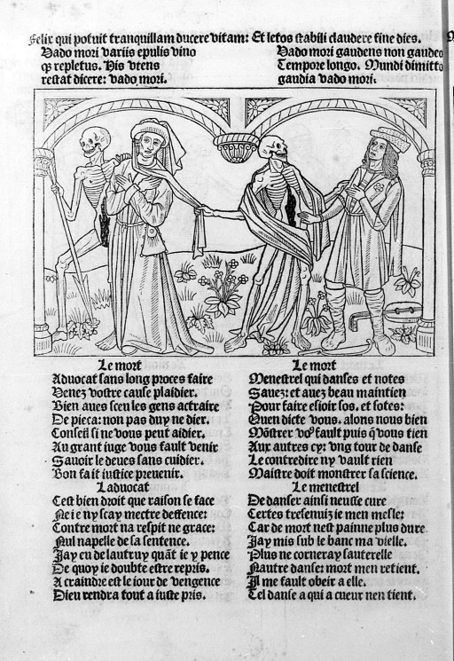 La Danse macabre. Paris, Guy Marchant, 1486 : Un avocat et un ménestrel. Illustration numérisée d'après le microfilm R 1760, Paris, BnF (Réserve des Livres rares et précieux), cote : Res Ye 189/Microfilm R 1760